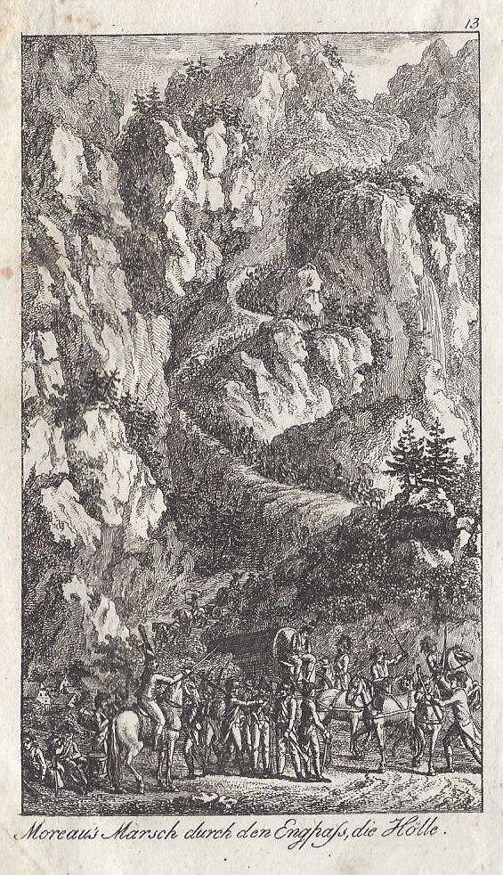 General Moreaus Marsch durch die Hölle im Oktober 1796. Kupferstich aus dem Revolutionsalmanach 1801